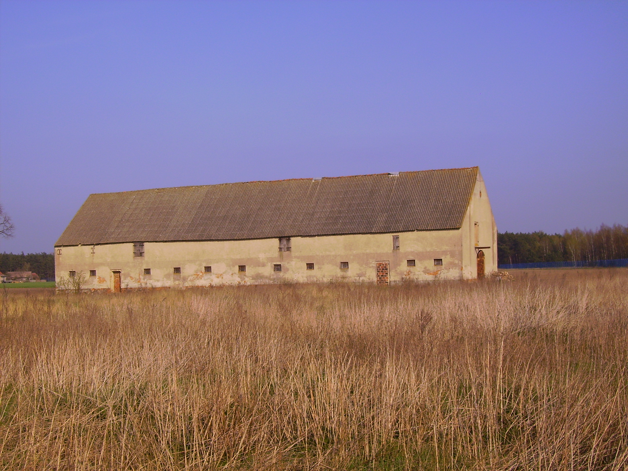 Budynek folwarczny w Ruchocinie